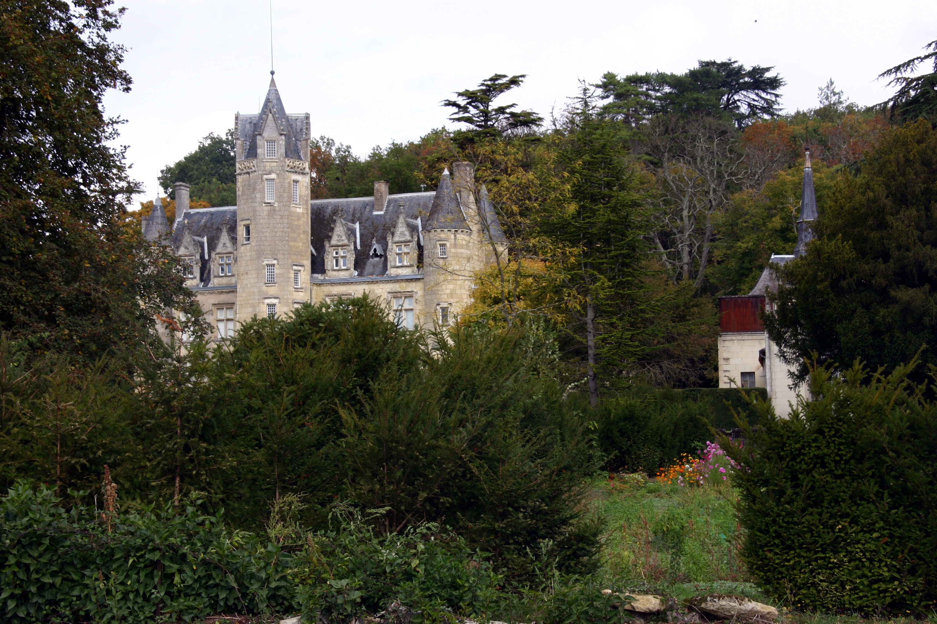 Beaumont-en-Véron